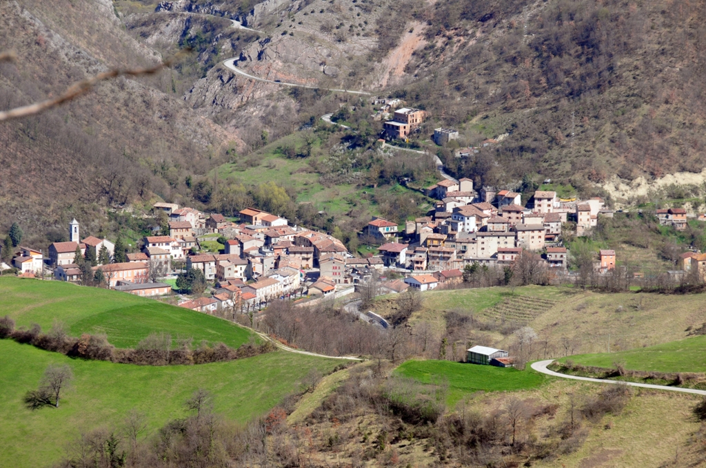 Panorama di Pianello (Cagli)